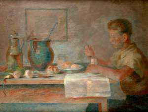 Pawel Dadlez (1904-1940)) - Śniadanie